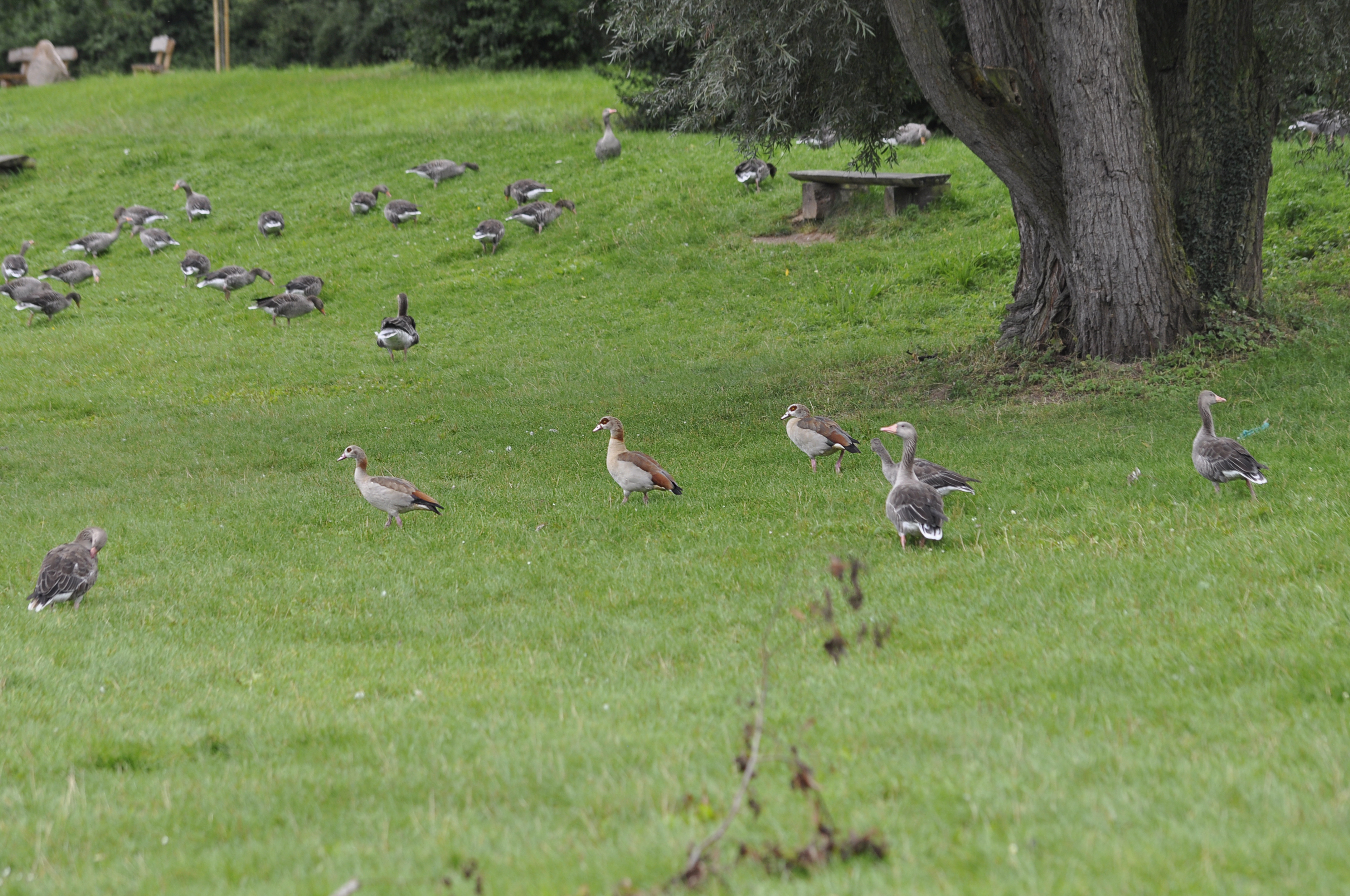 Nilgänse und Graugänse am Wendebachstausee bei Göttingen, 23.8.2014. Foto: F. Welter-Schultes